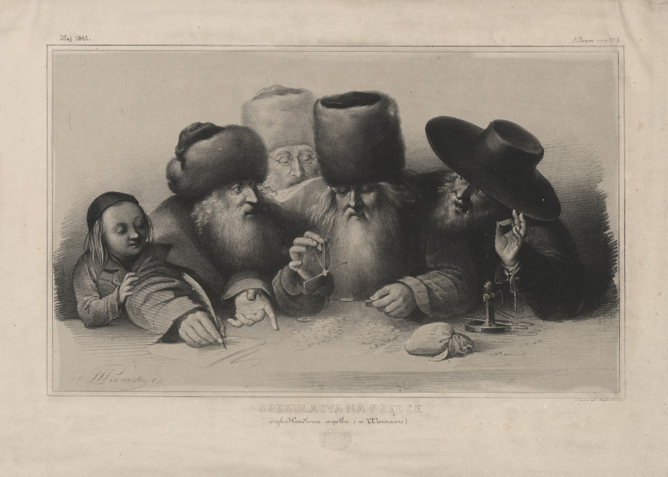 Album cynkograficzno-rysunkowe warszawskie